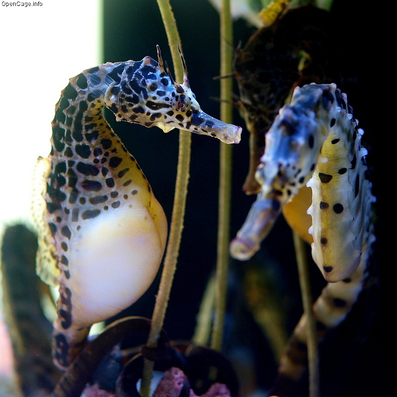 Hippocampus abdominalis, pareja